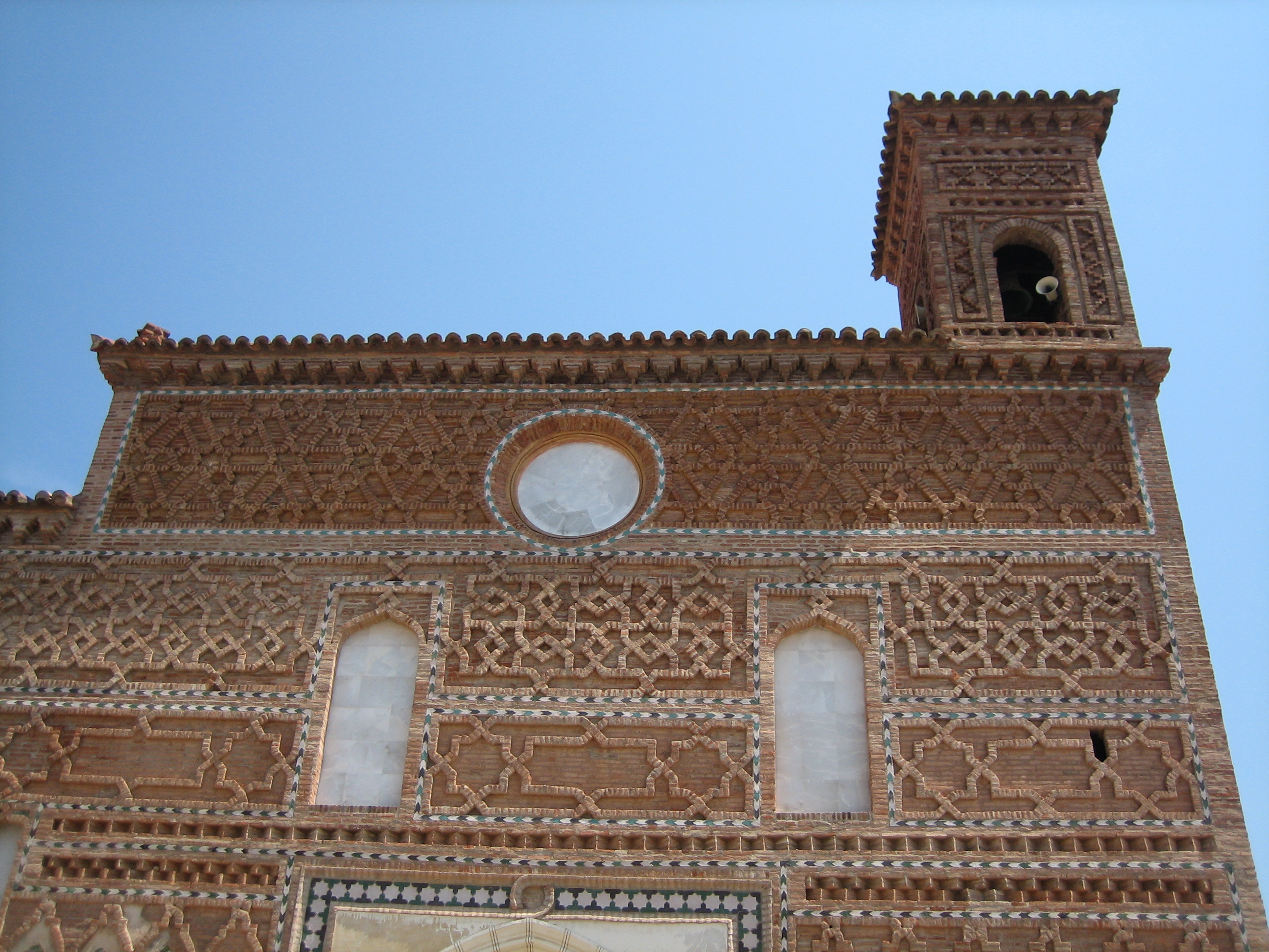 Iglesia de Santa María de Tobed